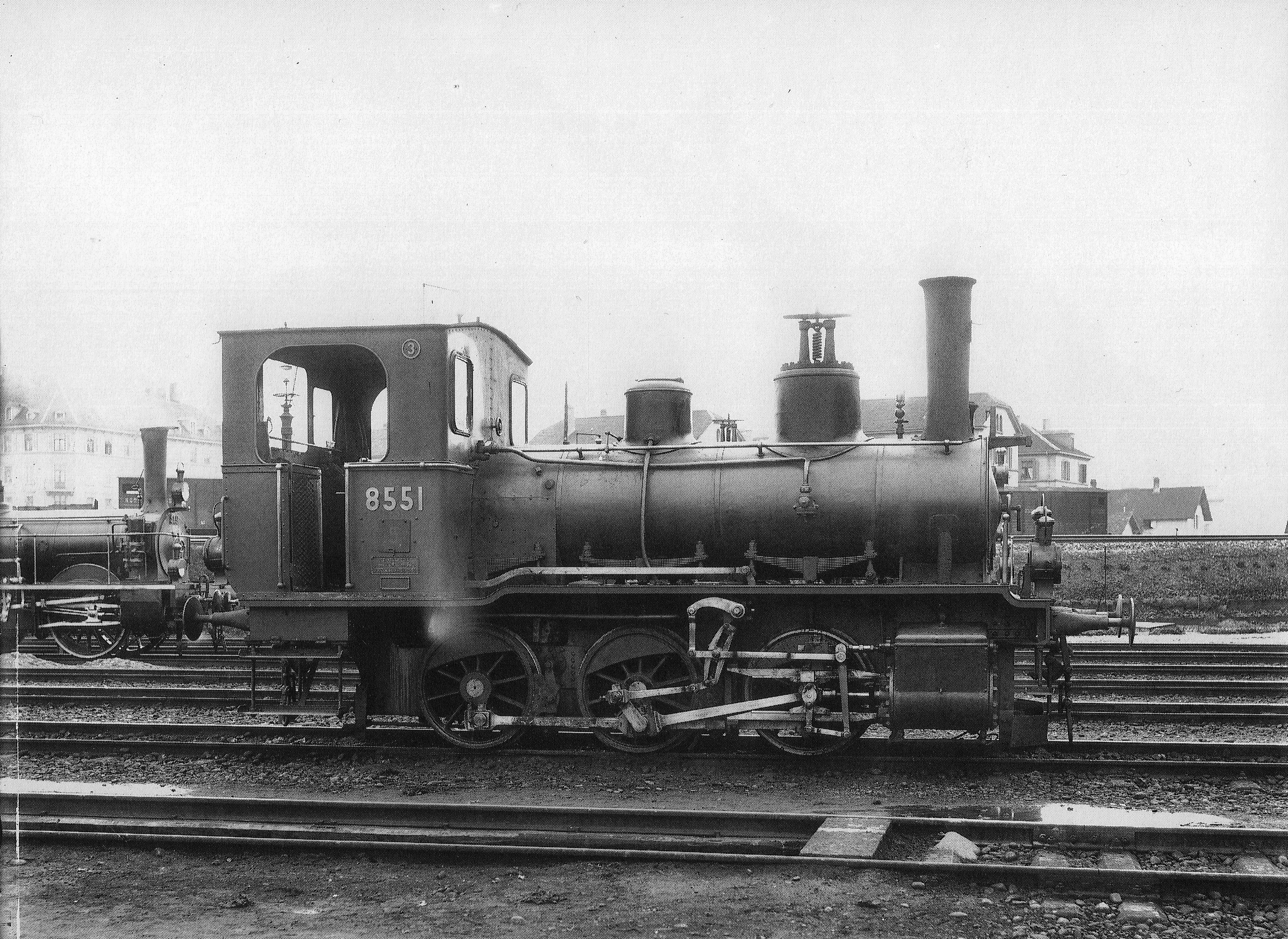 Tender-Locomotive Nr. 8551 des Typs E 3/3 der Schweizeriſchen Bundesbahnen, gebaut 1894 inn der Schweizeriſchen Locomotiv- und Machines-Fabrique zů Winterthur (Fabr.-Nr. 897), bis 1895 F3 Nr. 253, dann bis 1902 Nr. 453 der Schweizeriſchen Nordoſtbahn, 1935 an die Reederey Baſel verkauft, seit 1963 auf dem Spielplatze des Schifferkinderheims zů Kleinhüningen aufgeſtellt, seit Februar 2010 im Dépôt zů Brugg eingeſtellt; aufgnommen zwiſchen 1902 und 1905 im Fahrzeug-Dépôt F zů Zürich.